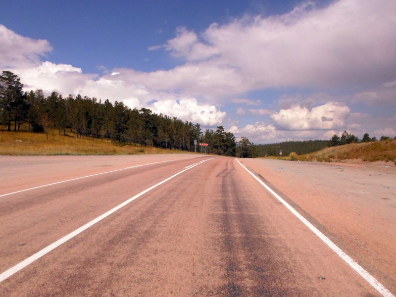 Перевал Убиенный. Перед северным спуском. Хребет Моностой.